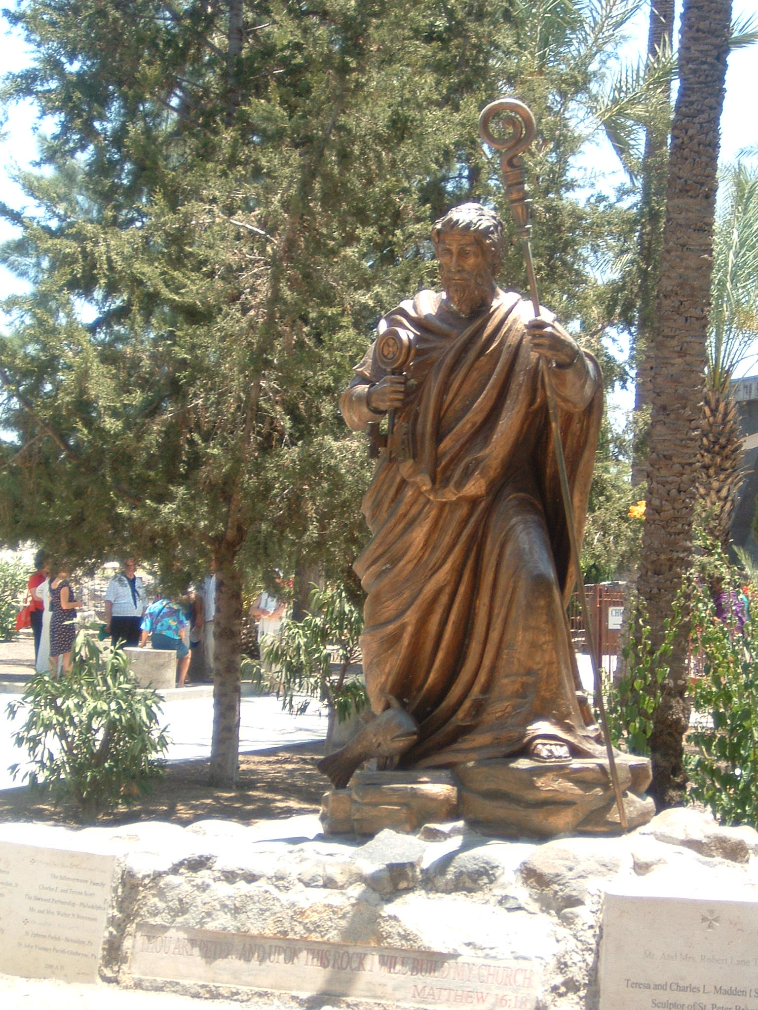 Foto scattata da me il 13 giugno 2008 Statua di San Pietro a Cafarnao